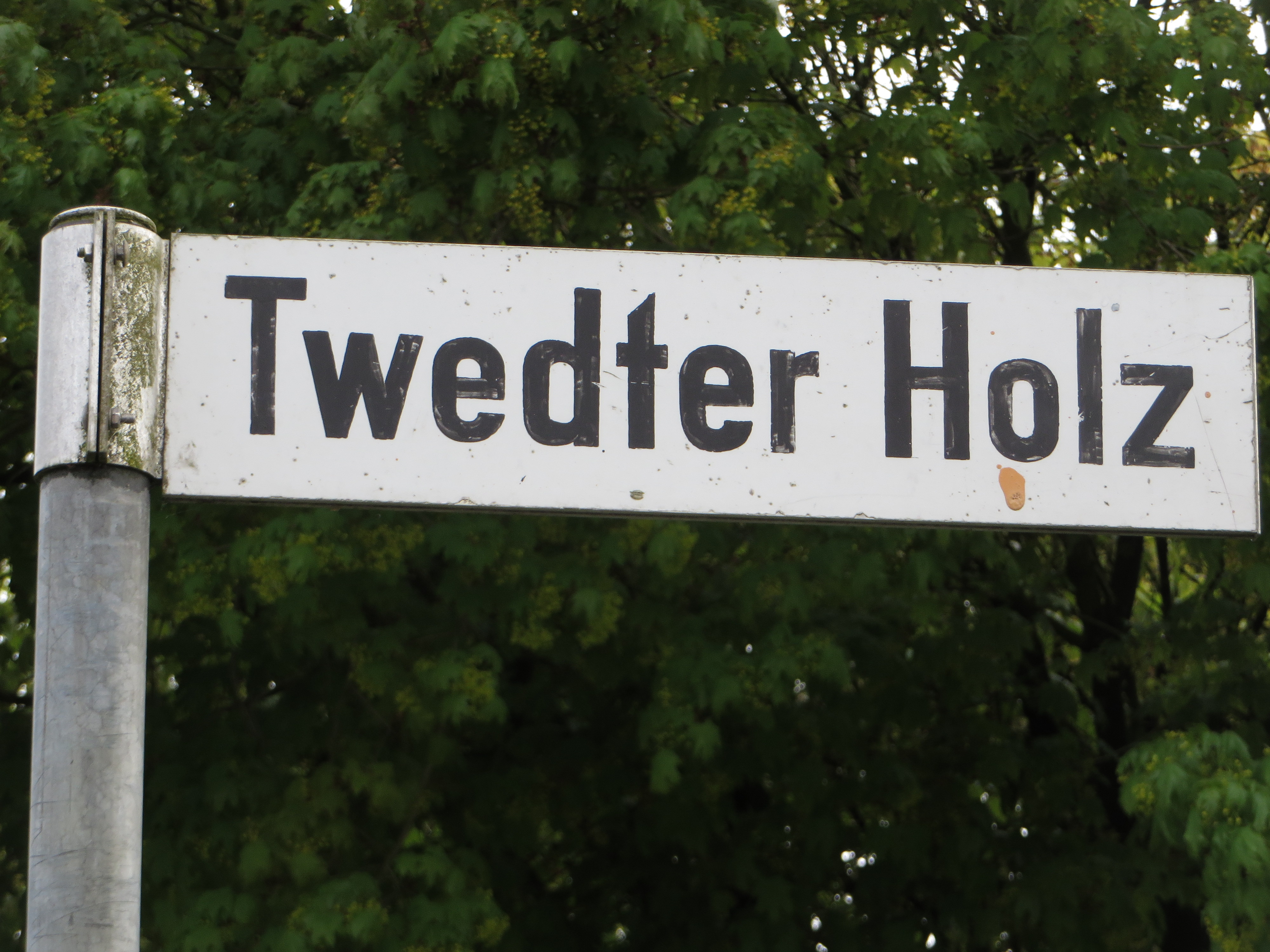 Straßenschild Twedter Holz, Bild 02